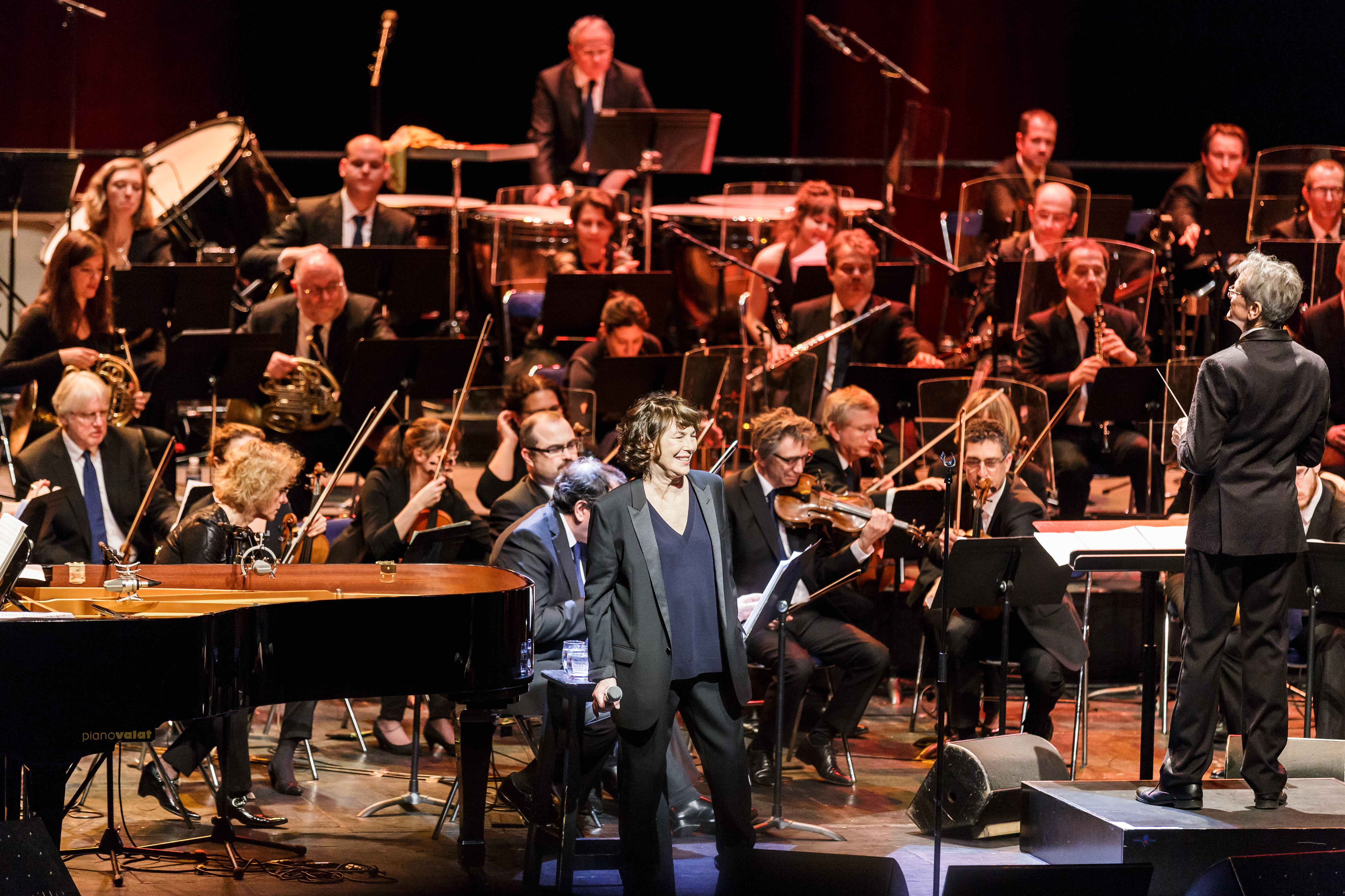 "Gainsbourg Symphonique", réarrangement des chansons de Serge Gainsbourg par le pianiste Nobuyuki Nakajima, interprétées par Jane Birkin avec l'Orchestre Symphonique de Bretagne au Quartz à Brest le 10 février 2017.